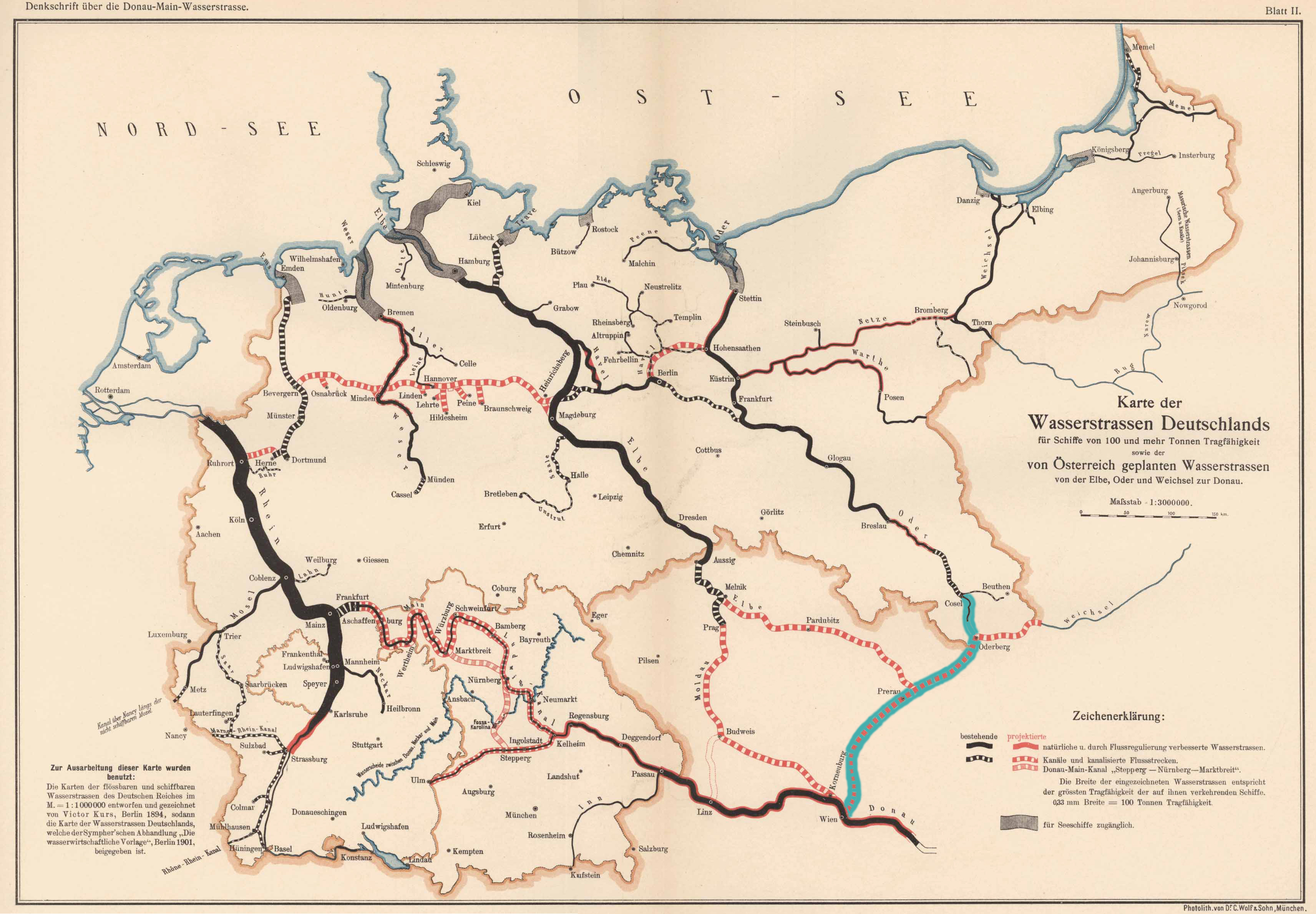 Karte der Wasserstrassen Deutschlands für Schiffe von 100 und mehr Tonnen Tragfähigkeit sowie der von Österreich geplanten Wasserstrassen von der Elbe, Oder und Weichsel zur Donau. Karte (Blatt II) aus Denkschrift zu dem technischen Entwurf einer neuen Donau-Main-Wasserstrasse von Kelheim nach Aschaffenburg, bearbeitet von Eduard Faber [(† 1930)], kgl. Bauamtmann und Vorstand des technischen Amtes des Vereines für Hebung der Fluss- und Kanalschiffahrt in Bayern. Verlegt von dem Vereine für Hebung der Fluss- und Kanalschiffahrt in Bayern. 1903. Der Donau-Oder-Kanal wurde nachträglich türkis hervorgehoben.